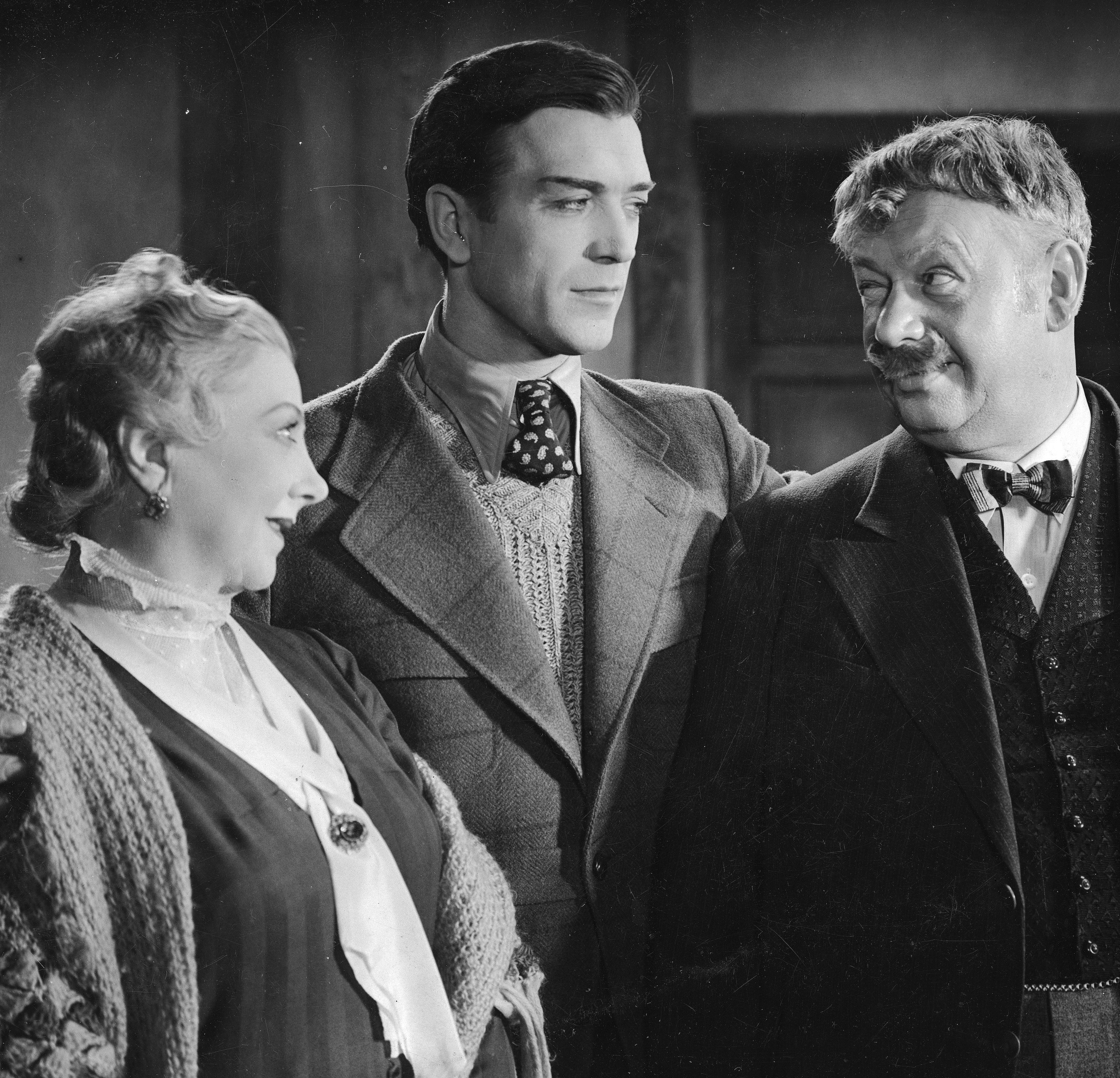 Mieczysława Ćwiklińska, Jerzy Pichelski i Aleksander Zelwerowicz w jednej ze scen filmu Granica (1938 r.)